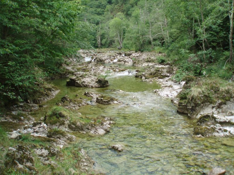 Río Dobra en Asturias